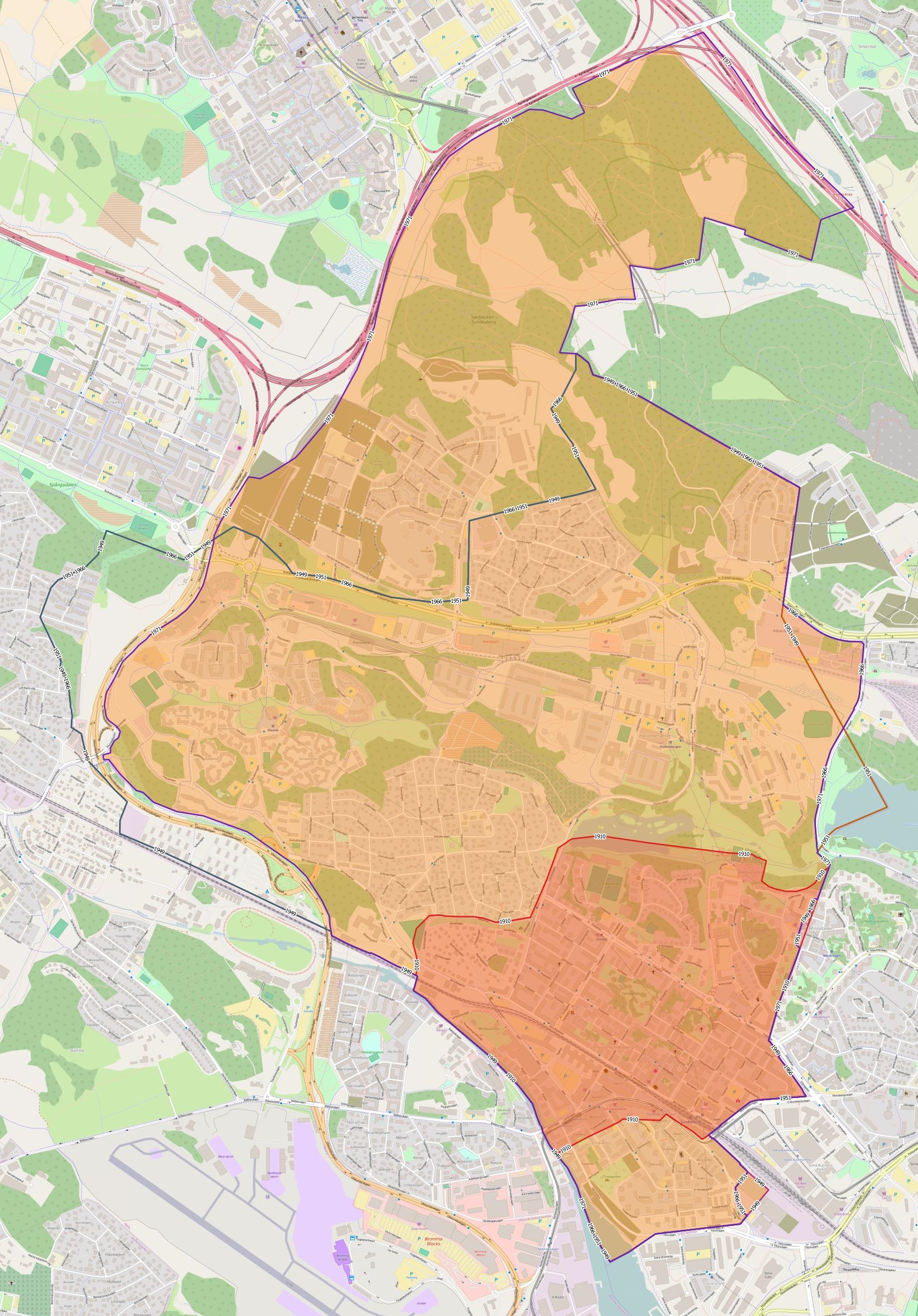 Sundbybergs församling 1910, 1949, 1950, 1951, 1956, 1966 och 1999. Rött – den ursprungliga församlingen, orange – församlingen 1999.